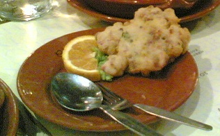 Pataniscas de bacalhau, um prato típico de Portugal. Pataniscas de bacalhau, a typical portuguese cod fish dish.